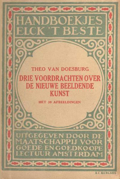 Cover of Drie voordrachten over de nieuwe beeldende kunst